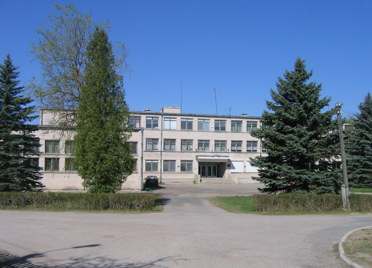 Autoriaus nuotrauka, 2006.05.08. Subačiaus vidurinė mokykla. Nuotrauka gali būti platinama pagal GFDL licenciją.